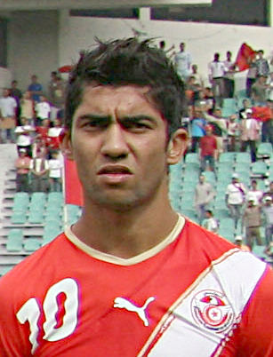 Oussama_Darragi, joueur tunisien de football